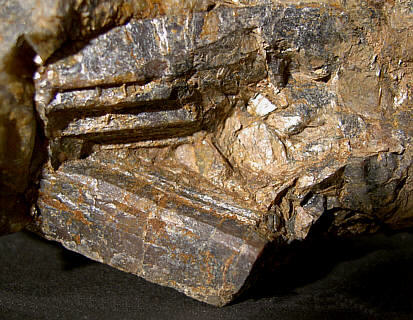 Andalusit-Kristalle / Fundort: Nordostbayern